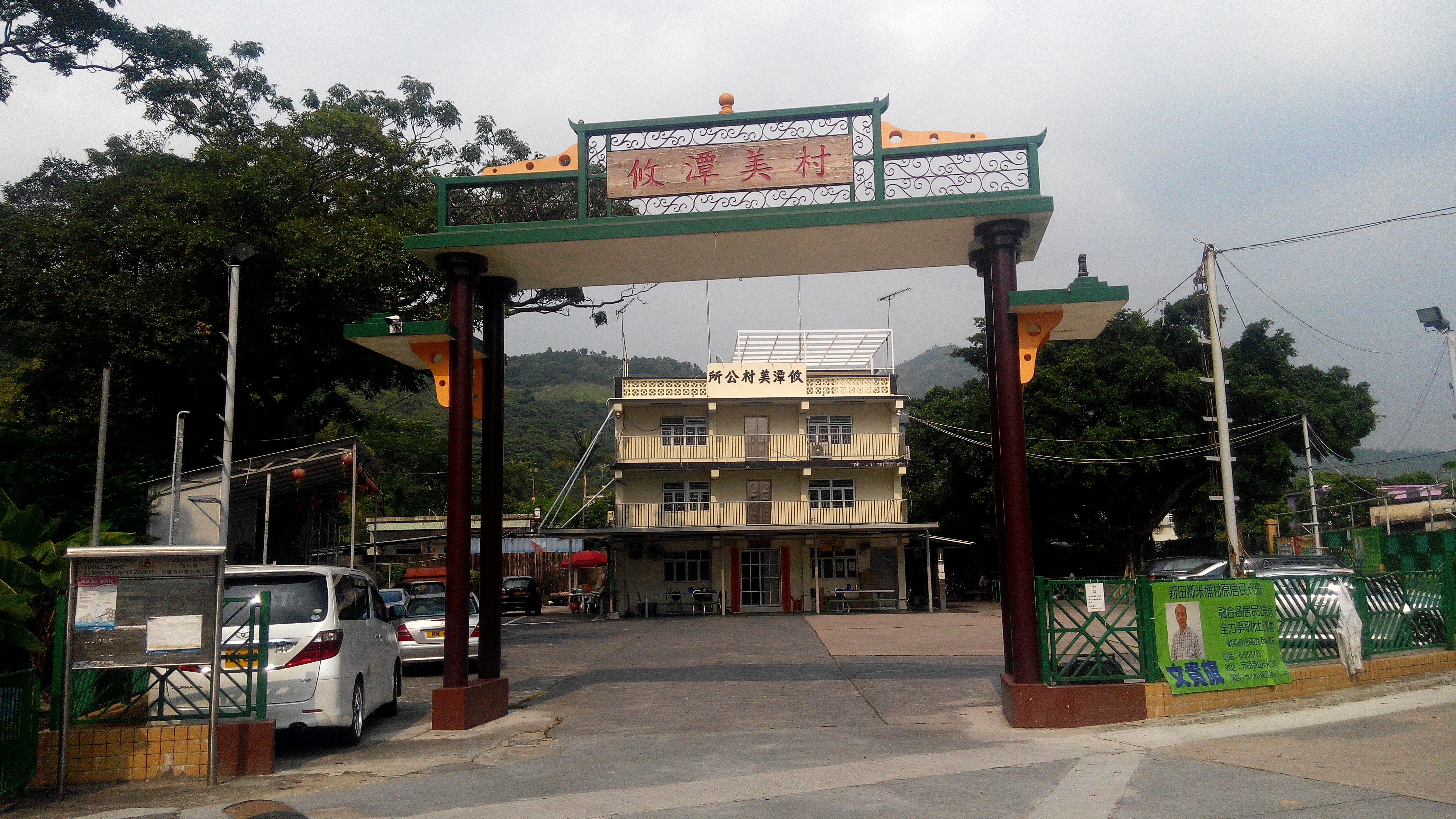 悠潭美村